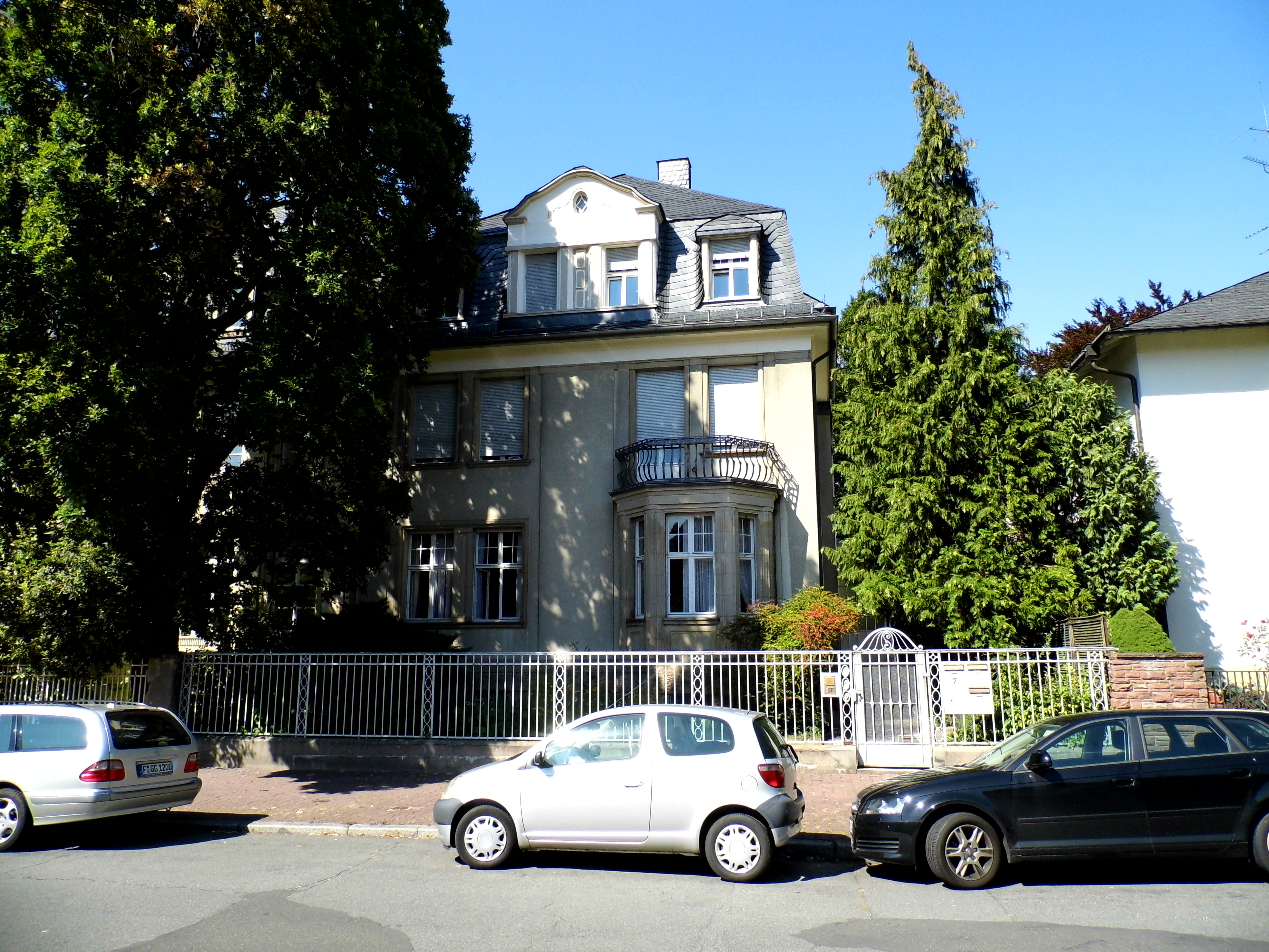 Frankfurt, Broßstraße 5. 1911, Neoklassische Villa nach Entwurf von Alfred Bruno Engelhardt (1867-N.N.) mit reich gegliederter symmetrischer Fassade, profilierten Fenstergewänden aus Sandstein und skulptierten Brüstungsfeldern. Weitere Arbeit 1912, Neoklassische Villa in der Zeppelinallee 77. Eigentümer war die Familie des Dr.jur. Johannes Moritz Steinthal (* 27.08.1869 Bradford/England + 12.03.1943 Selbstmord vor Verfolgung durch Gestapo), jüngster Sohn des aus Hamburg gebürtigen Wollkaufmanns Carl Gustav Steinthal. Seit 1902 war er Syndikus und später auch Prokurist der Leopold Casella GmbH, seit 1926 bei der I.G. Farbenindustrie in Frankfurt. Am 1. Weltkrieg nahm er freiwillig teil, zuletzt als Hauptmann, und wurde mit dem Eisernen Kreuzen K.2 und E.K.1 ausgezeichnet. 1931 trat er in den Ruhestand. Er war Mitglied vieler Frankfurter Vereine. 1899 heiratete er Hedwig Engelhard, Tochter von Bernhard A. Engelhard und Johanna M. Hauck. Sie bekamen drei Töchter. J. M. Steinthal entstammte einer seit 110 Jahren evangelisch-reformierten Familie, hatte aber drei jüdisch geborene Großeltern und galt damit für die Nazis als Jude und wurde deshalb von der Gestapo verfolgt und verhört. Ein sog. Stolperstein vor seinem Haus soll an ihn erinnern.